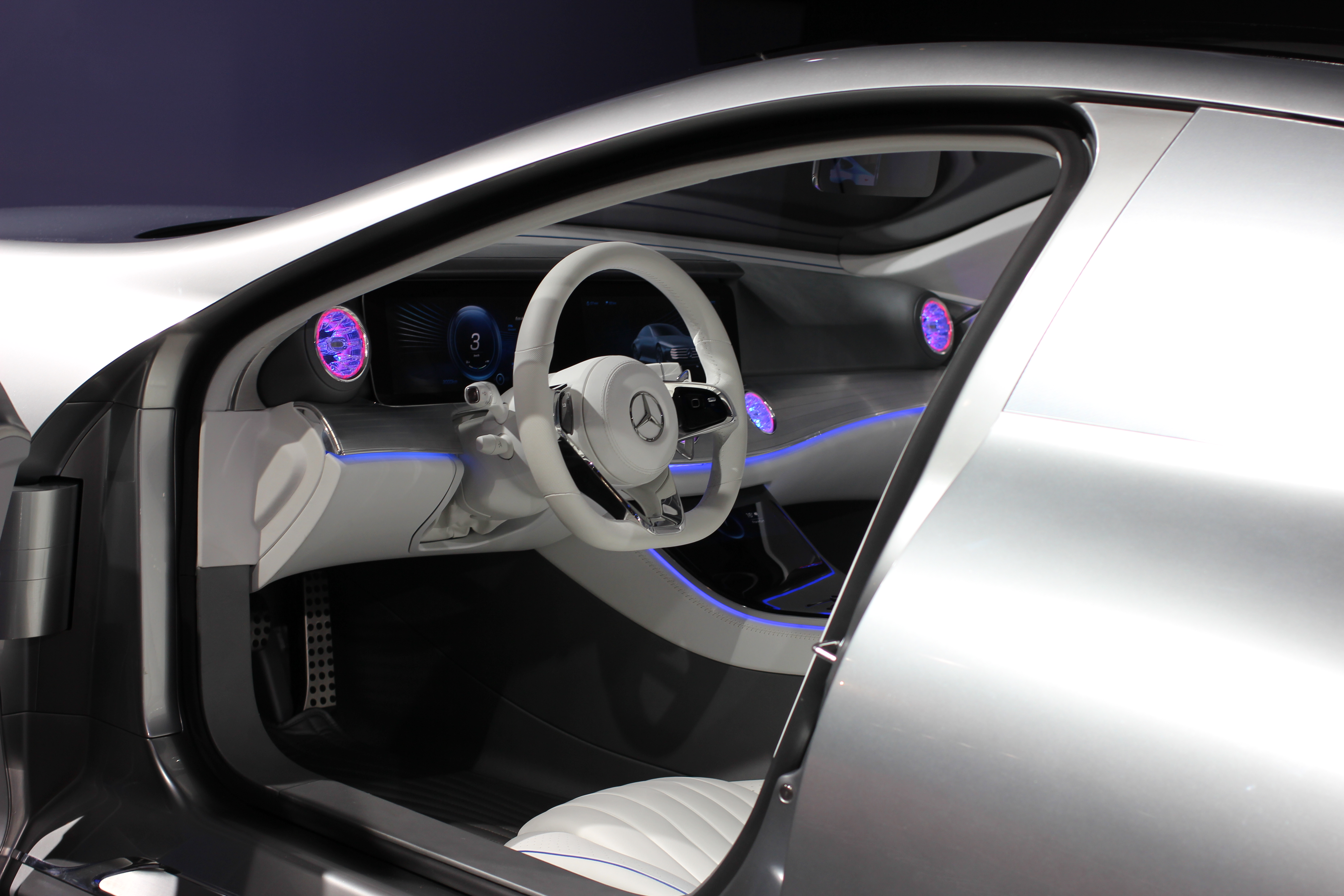 Mercedes Intelligent Aerodynamic Automobile